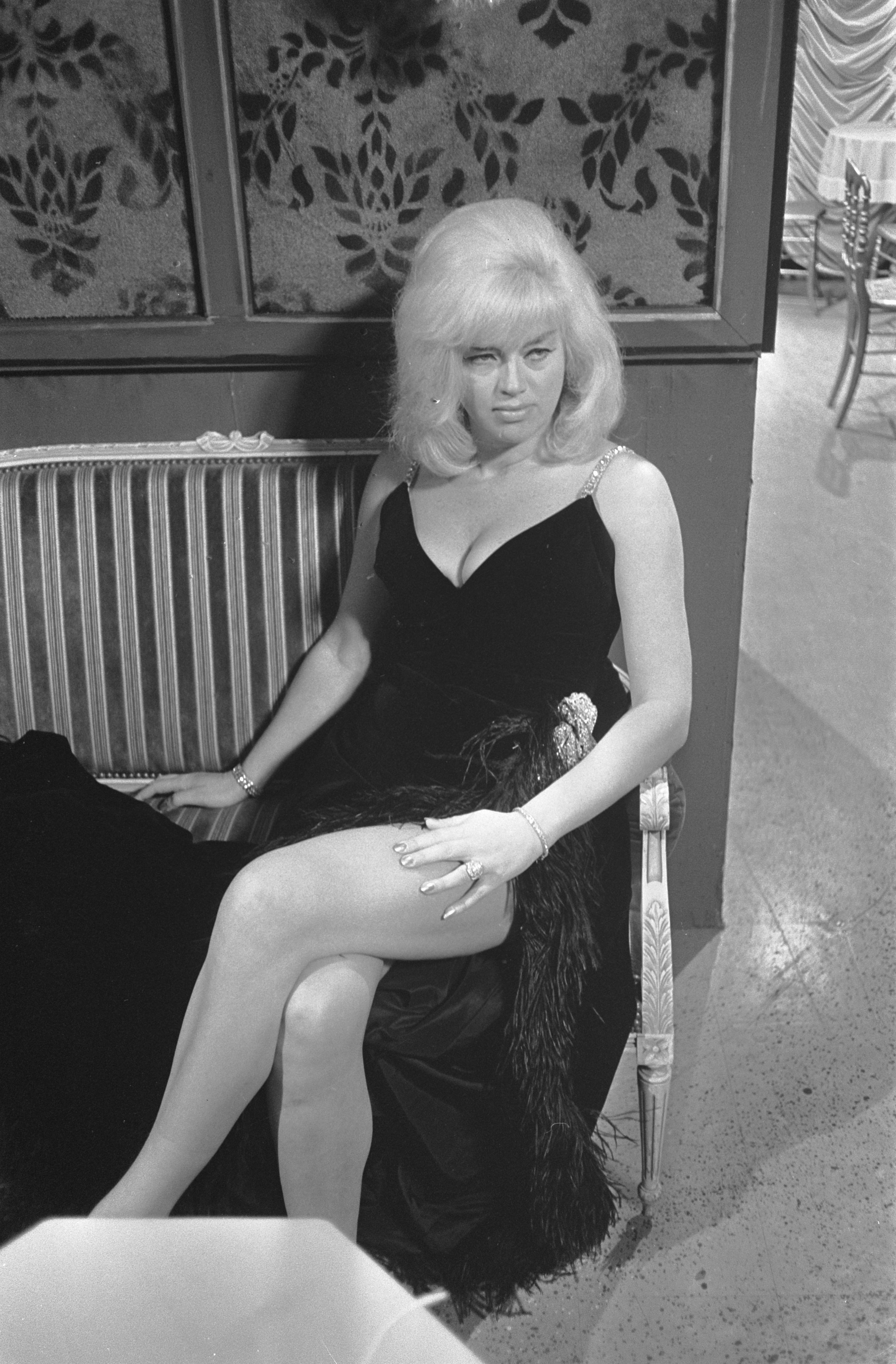 Collectie / Archief : Fotocollectie Anefo Reportage / Serie : Diana Dors in de Rudi Carrell show Beschrijving : Portret van Diana Dors Annotatie : Diana Dors (1931-1984) Datum : 19 oktober 1968 Locatie : Hilversum Trefwoorden : artiesten, portretten, televisieprogramma's Persoonsnaam : Dors, Diana Fotograaf : Fotograaf Onbekend / Anefo Auteursrechthebbende : Nationaal Archief Materiaalsoort : Negatief (zwart/wit) Nummer archiefinventaris : bekijk toegang 2.24.01.05 Bestanddeelnummer : 921-7796